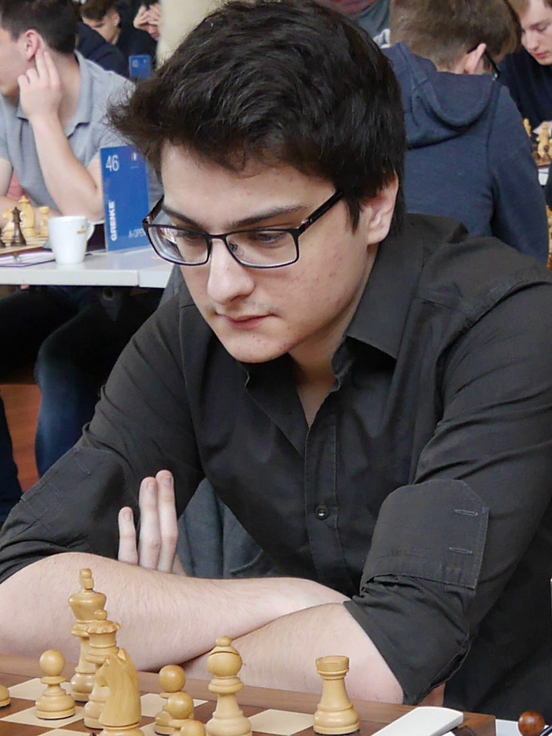 Maxime Lagarde, Runde 4 Grenke Chess Open 2018 in Karlsruhe.